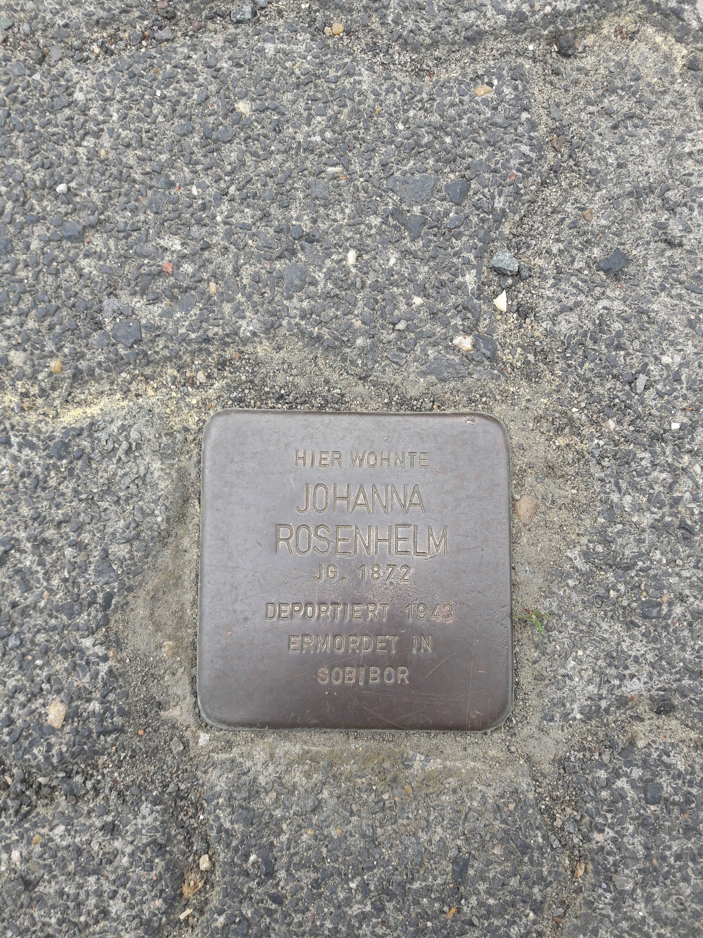 Stolperstein Hagener Straße 231, Kreuztal-Krombach